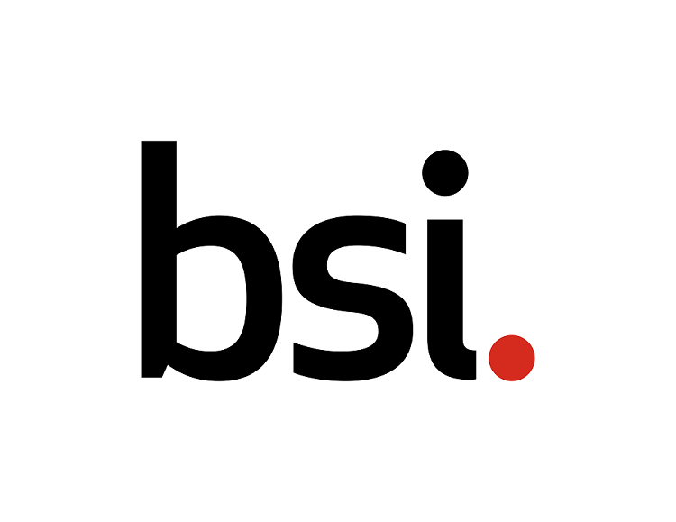 bsi logo